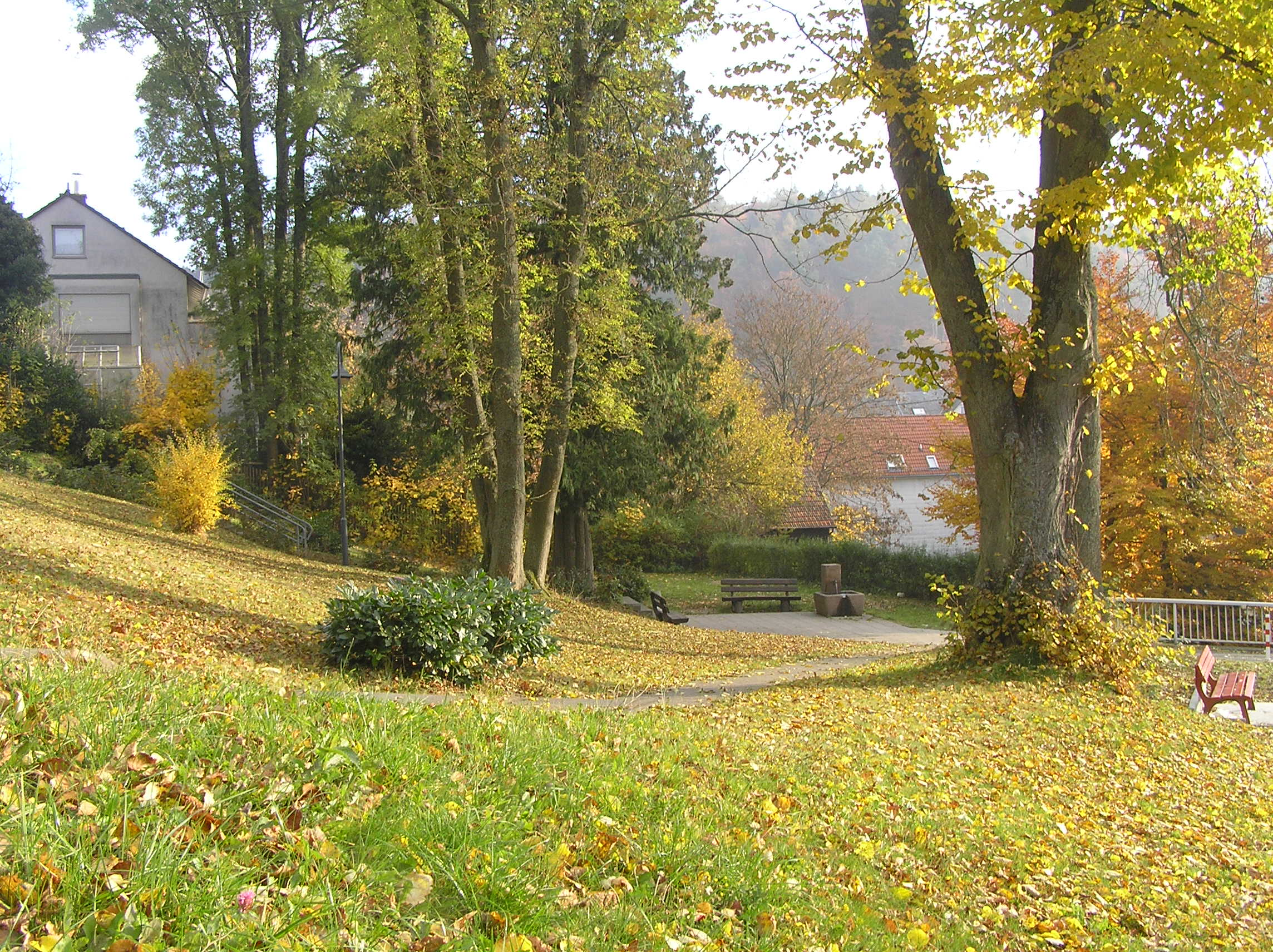 Park (ehemaliger Friedhof, gegenüber Rewe) in Schmitten, Taunus